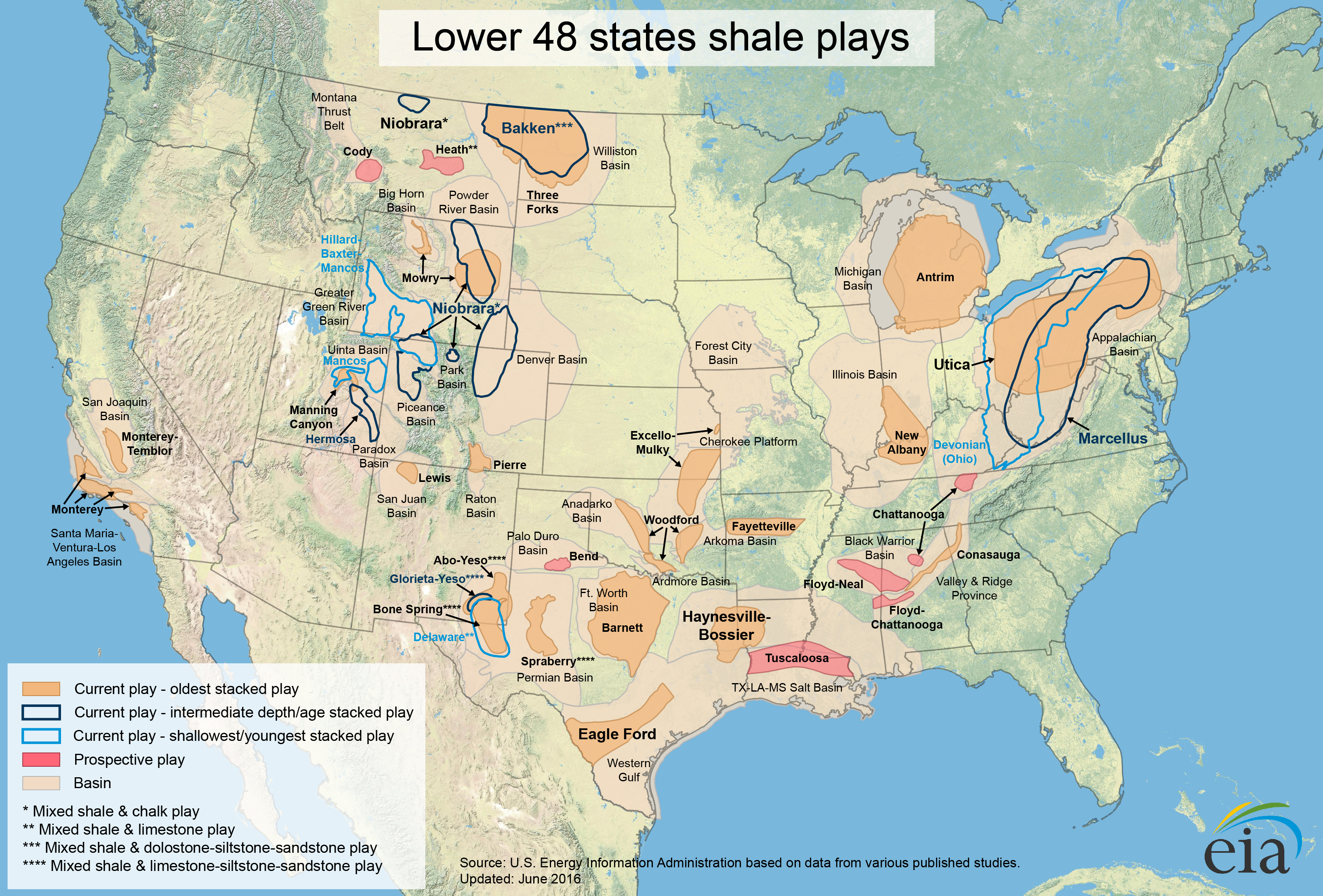 US shale gas map